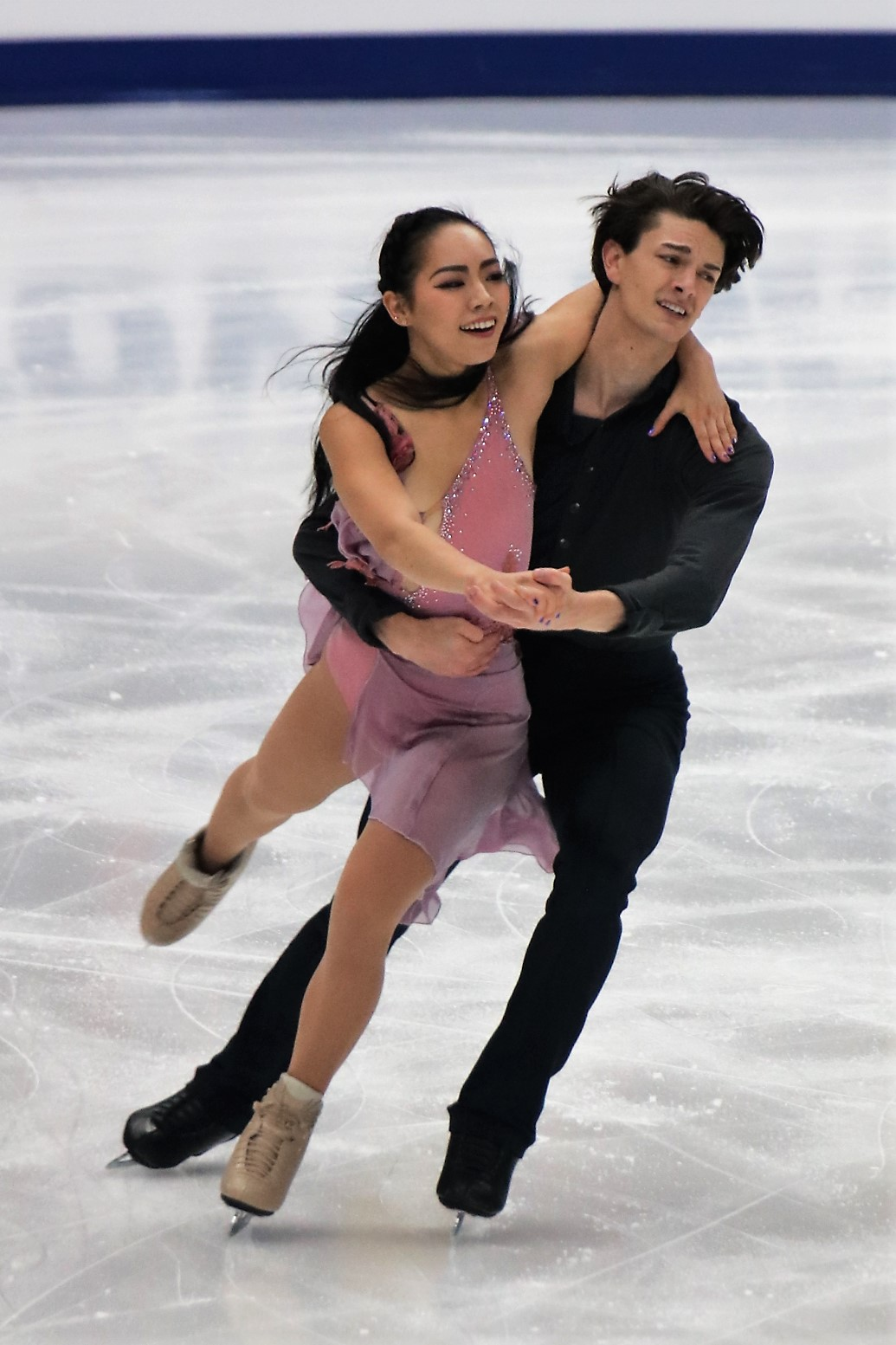 Мисато Комацубара / Тим Колето (Япония) на Rostelecom Cup 2018